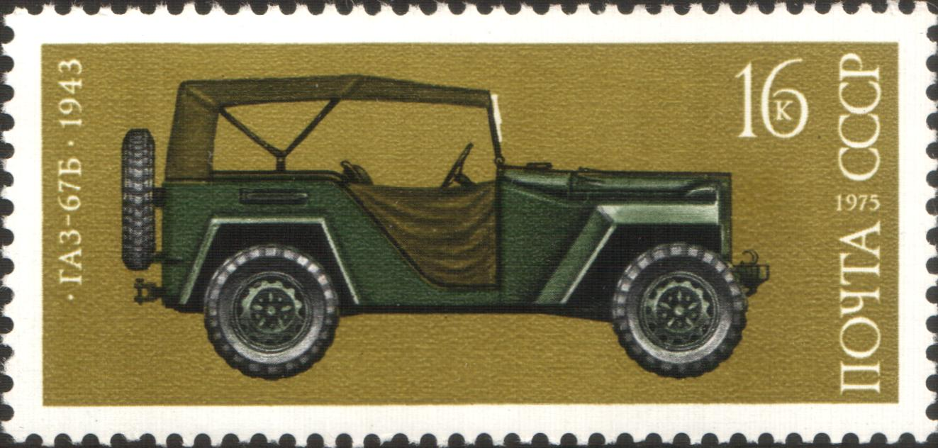 Легковой автомобиль ГАЗ-67Б. 1943 г. Художник: А. Коврижкин. Марка СССР 1975г., номинал - 16коп.